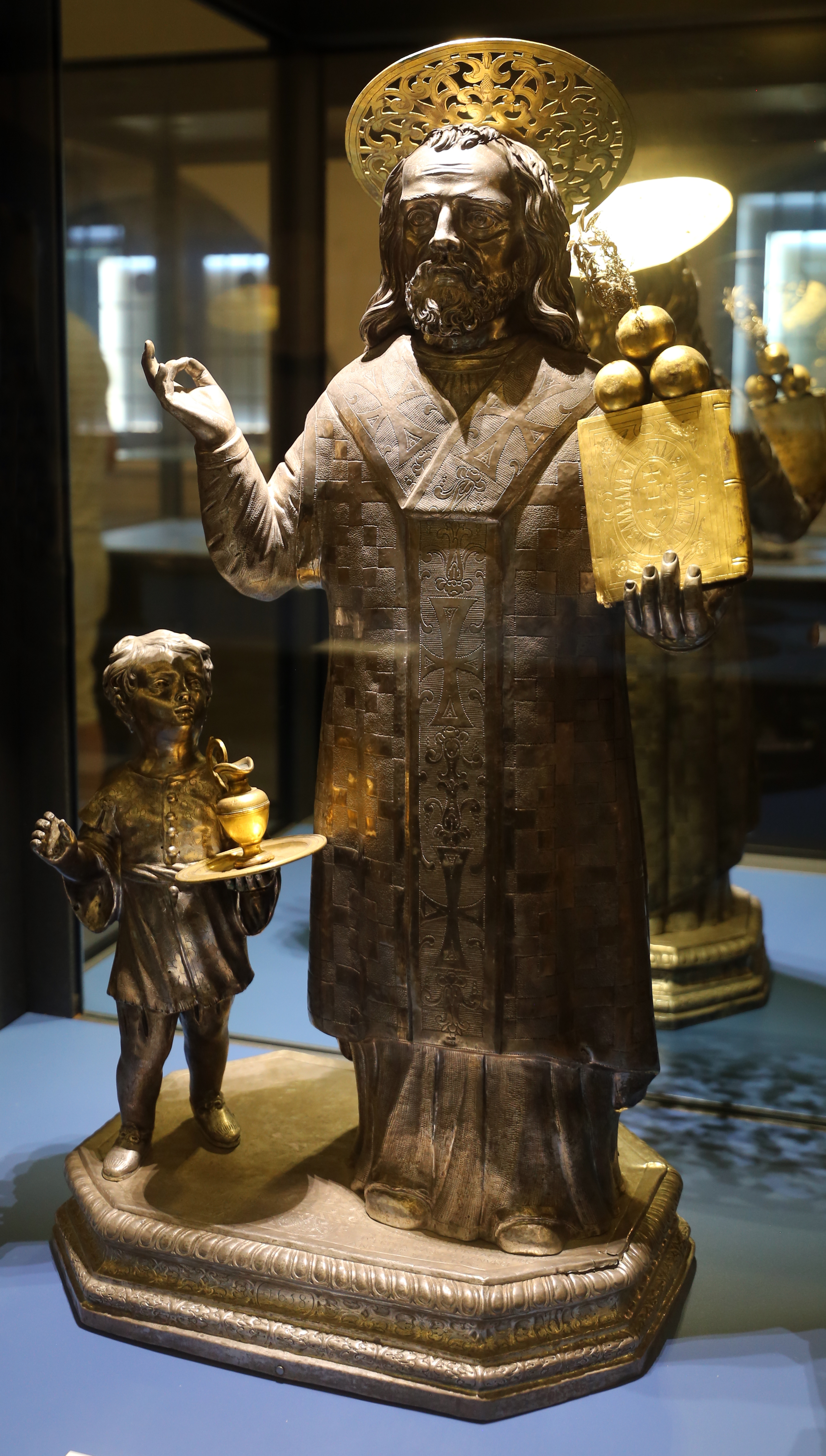 Museo nicolaiano This is a photo of a monument which is part of cultural heritage of Italy.